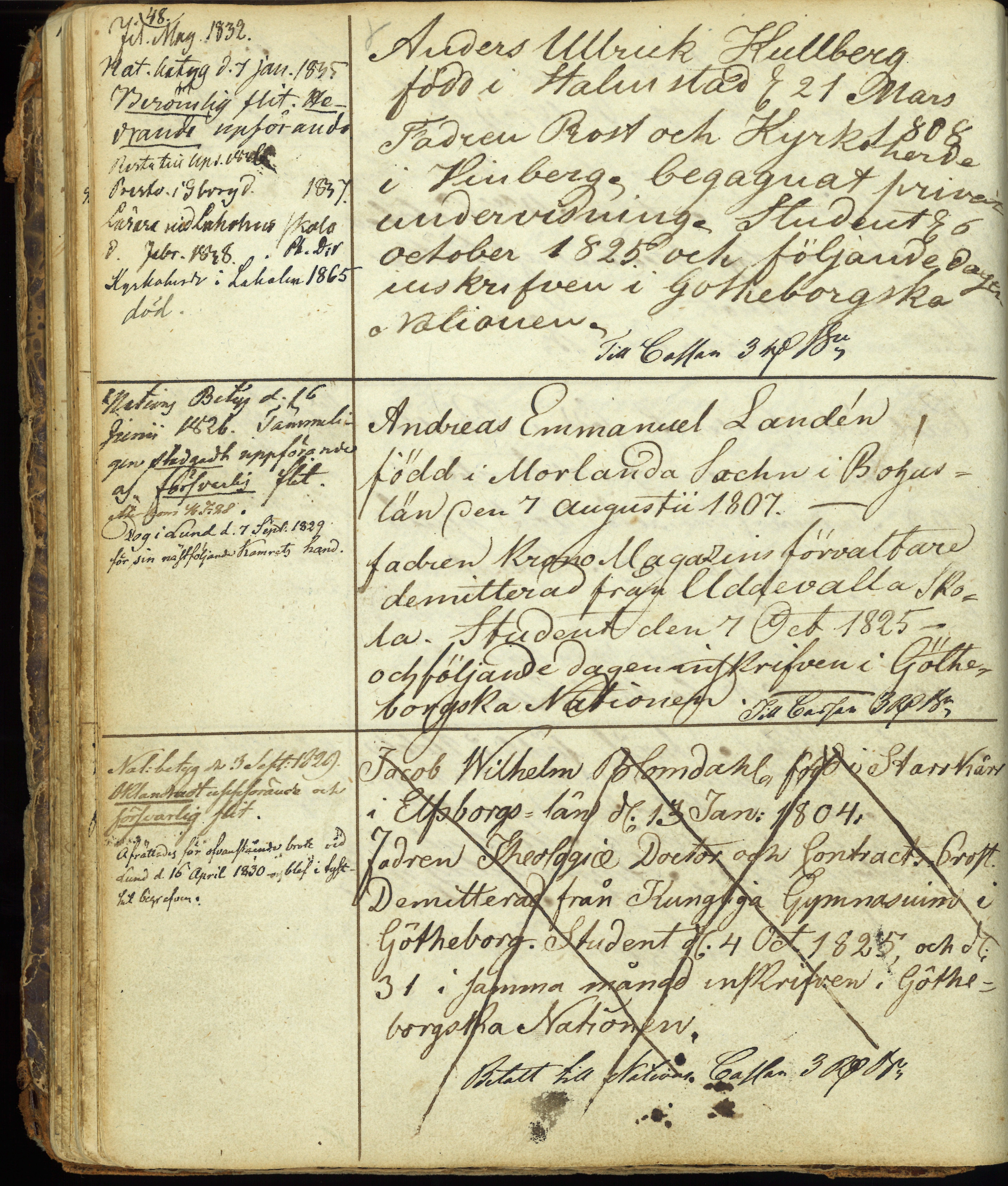 En sida ur Göteborgs nations i Lund matrikel från 1825, visande de två studenterna som var inblandade i mordet i Locus peccatorum.